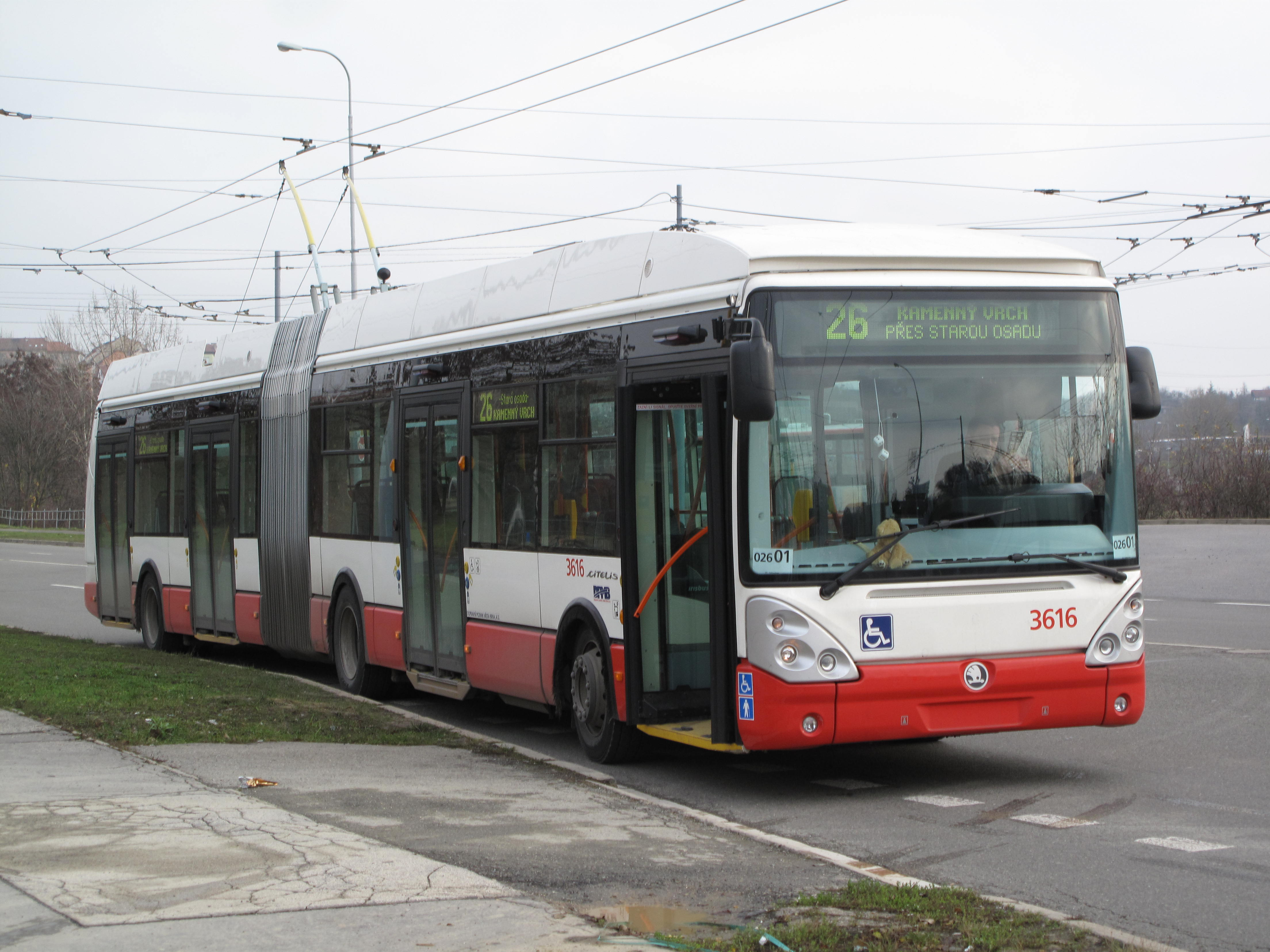 Kloubový trolejbus u Novolíšeňské